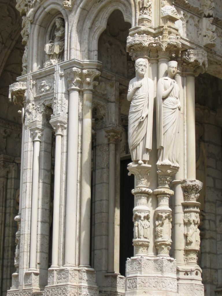 Porche Nord, portail central de la cathédrale de Chartres, statues de gauche